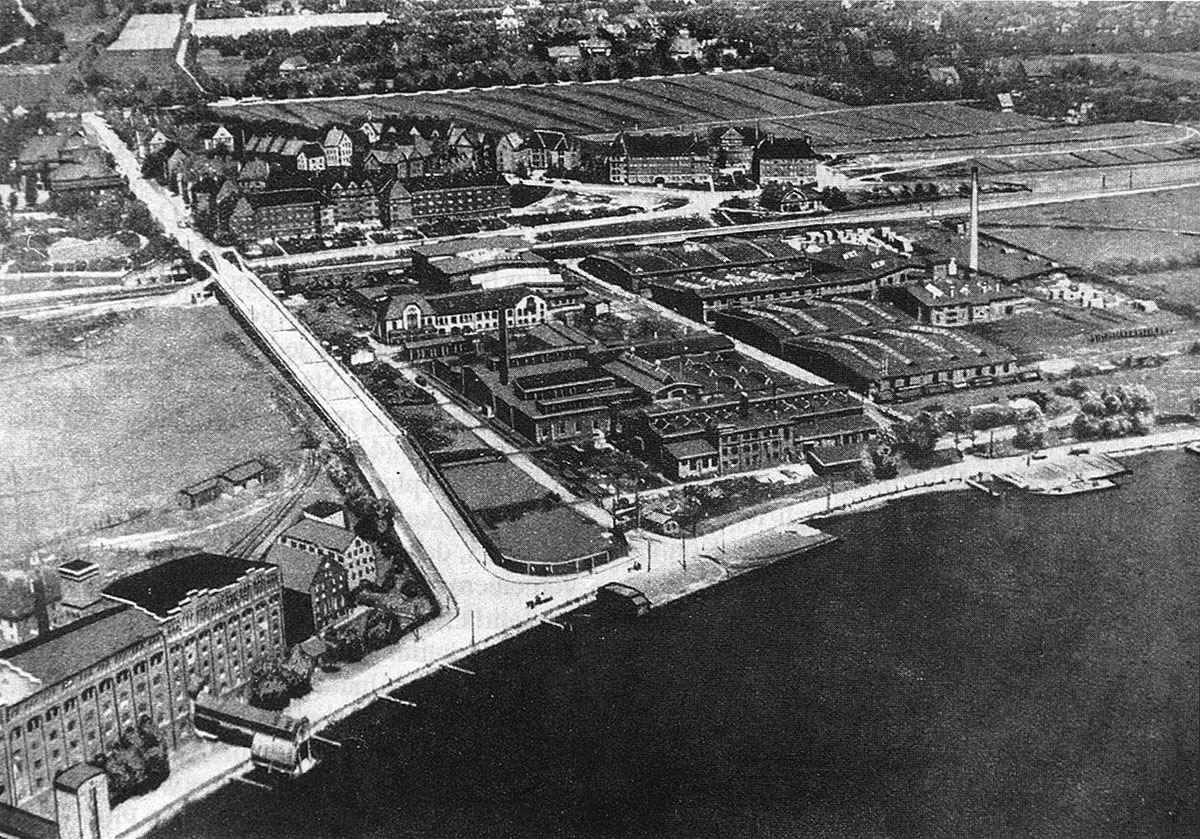 Ратсхоф с высоты птичьего полёта.